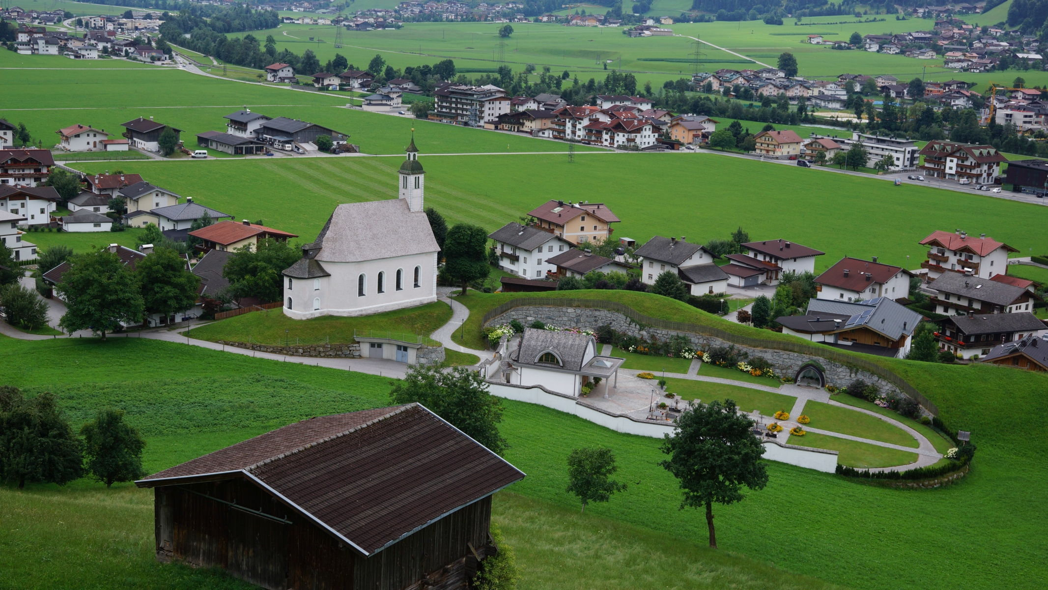 Kirche Ramsau